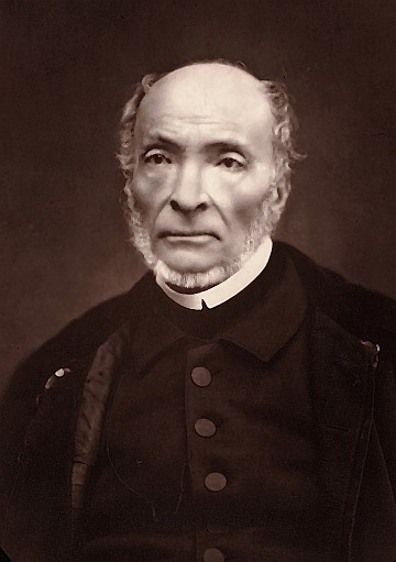 Victor Schoelcher photographié par Étienne Carjat [1], planche provenant de la Galerie contemporaine, littéraire, artistique, Paris, L. Baschet, 1876-1884.